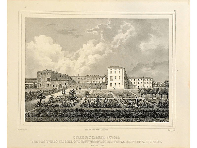 Collegio Maria Luigia veduto verso' gli orti, ove rappresantasi una parte costrutta di nuevo. Anni 1841-1842